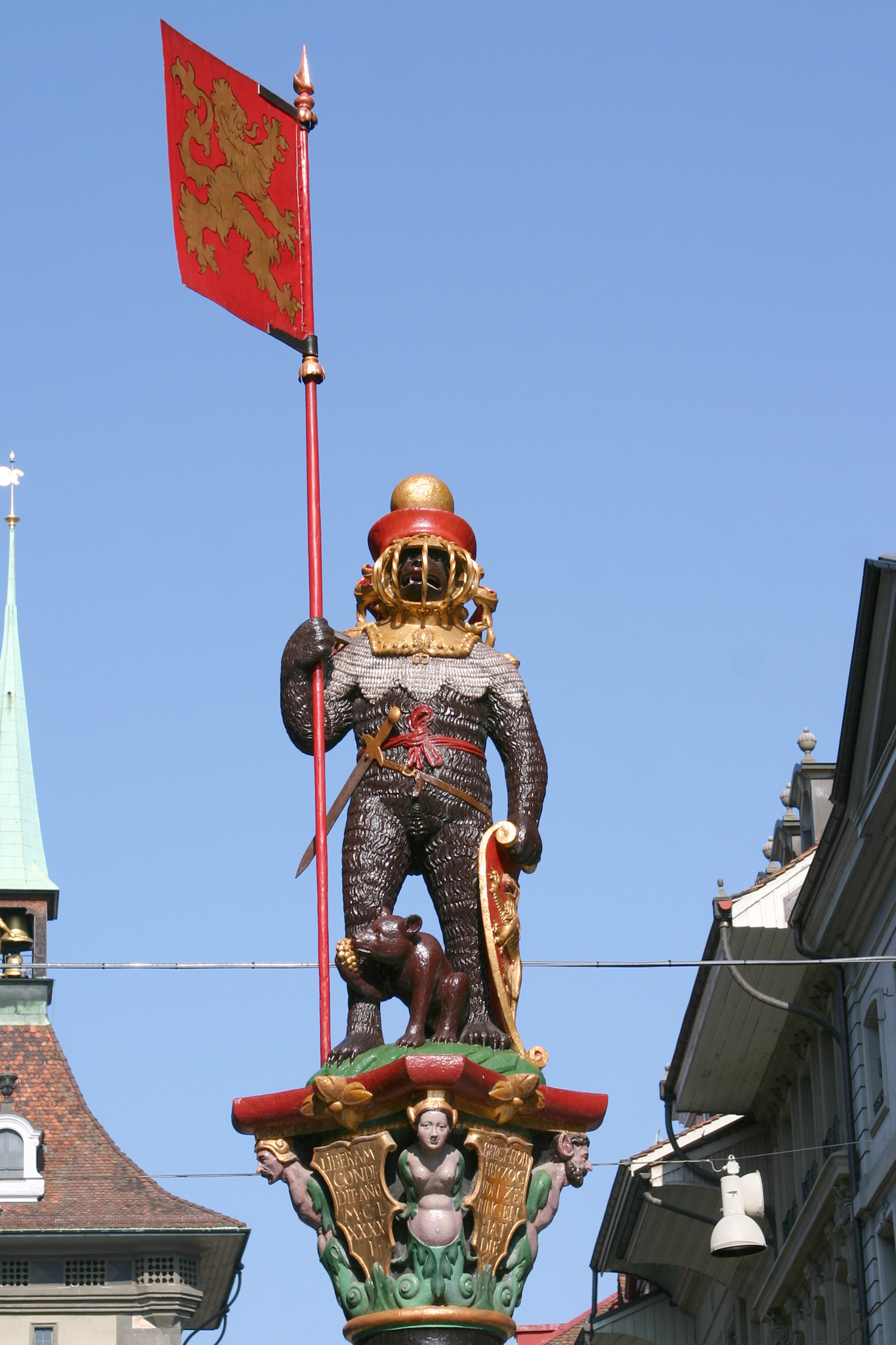 Zähringer Brunnen, Bern, Switzerland